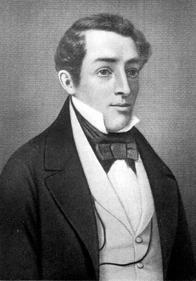 Jose Maria Heredia (1803–1839)